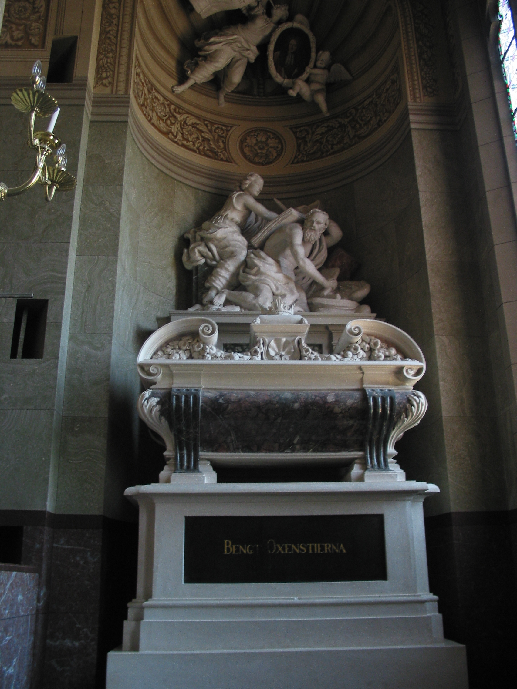 성당 안에 지역 유명인사들의 무덤이 잔뜩.